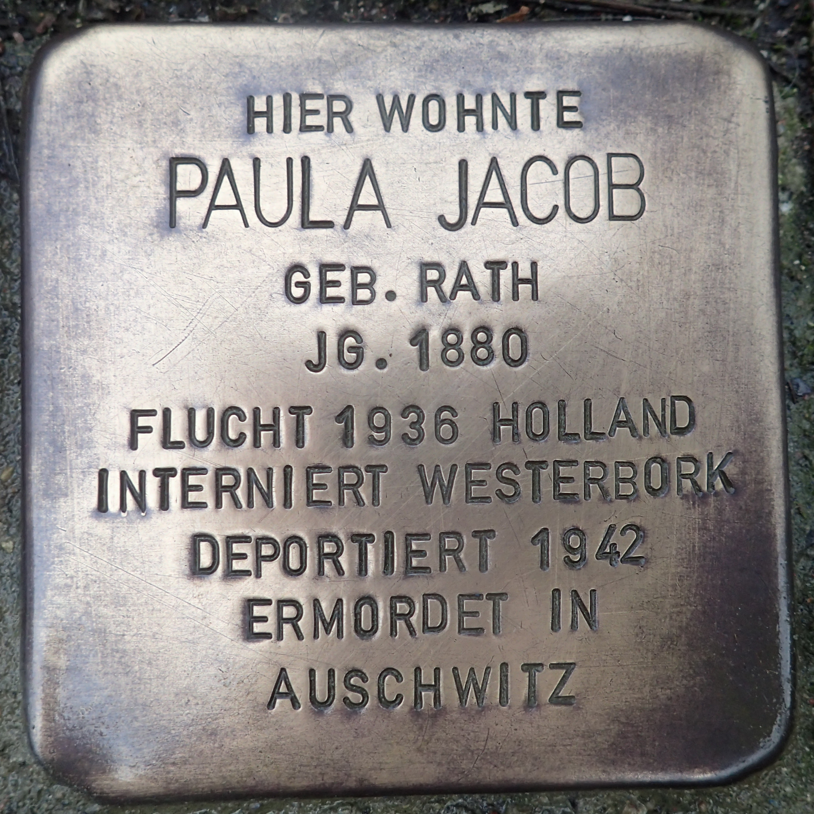 Stolperstein Geldern Gelderstraße 5 Paula Jacobs